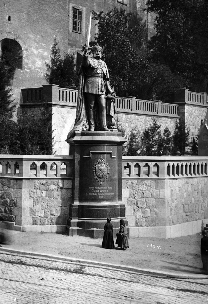 Königsberg